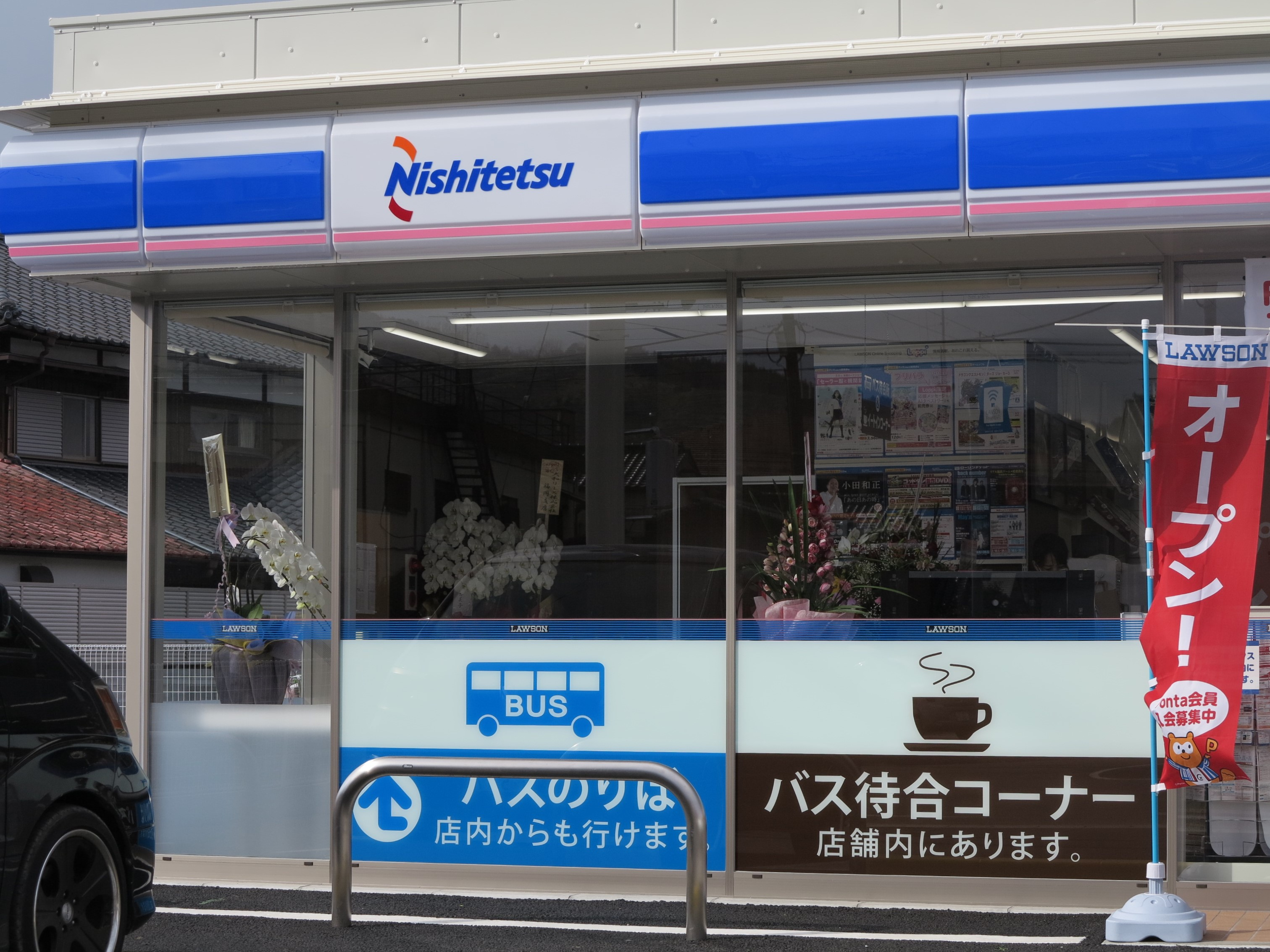 ローソン西鉄バス浮羽発着所店の西鉄ロゴ